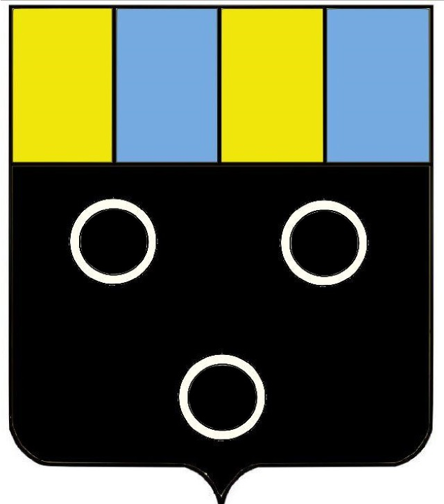 wapen de Boisot